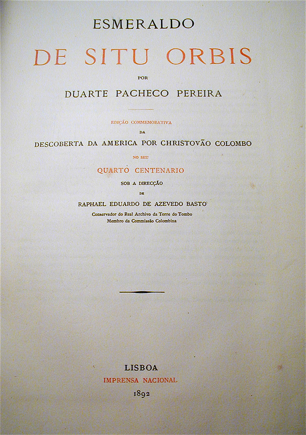 1ère édition de l'Esmeraldo de Situ Orbis de Duarte Pacheco Pereira, lisbonne, 1892